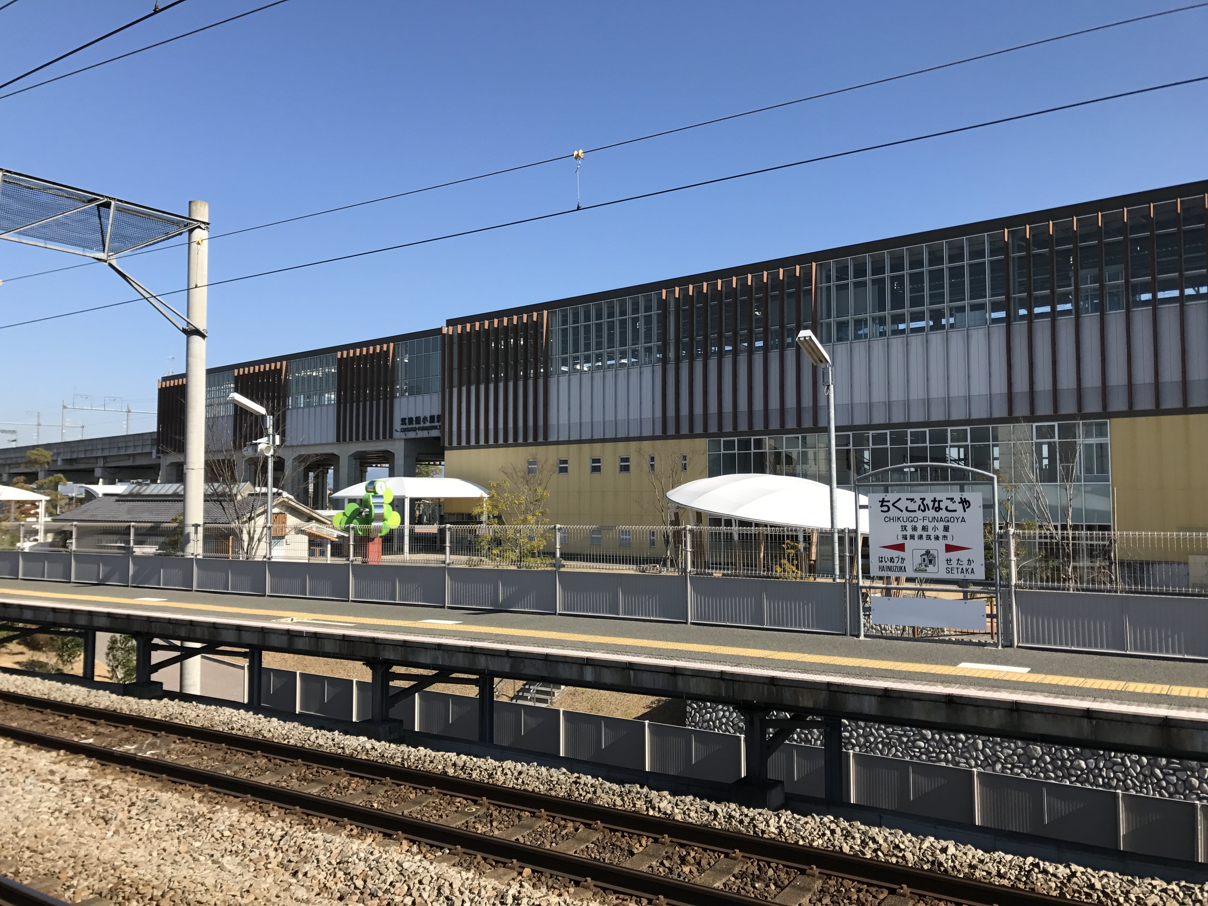 筑後船小屋駅(鹿児島本線)のホームより望む新幹線駅舎